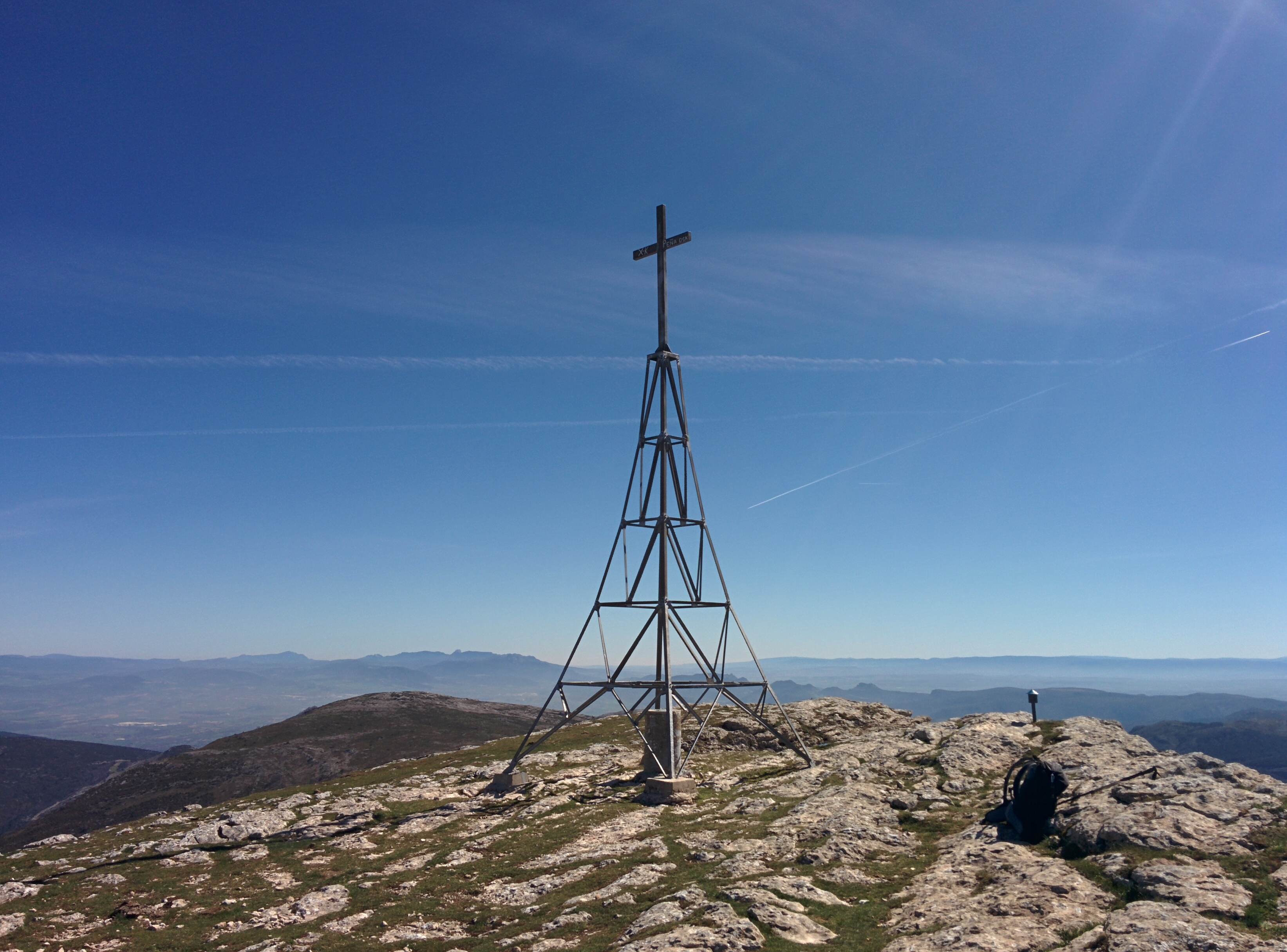 Cumbre del pico Humión (Partido de la Sierra en Tobalina, Burgos).